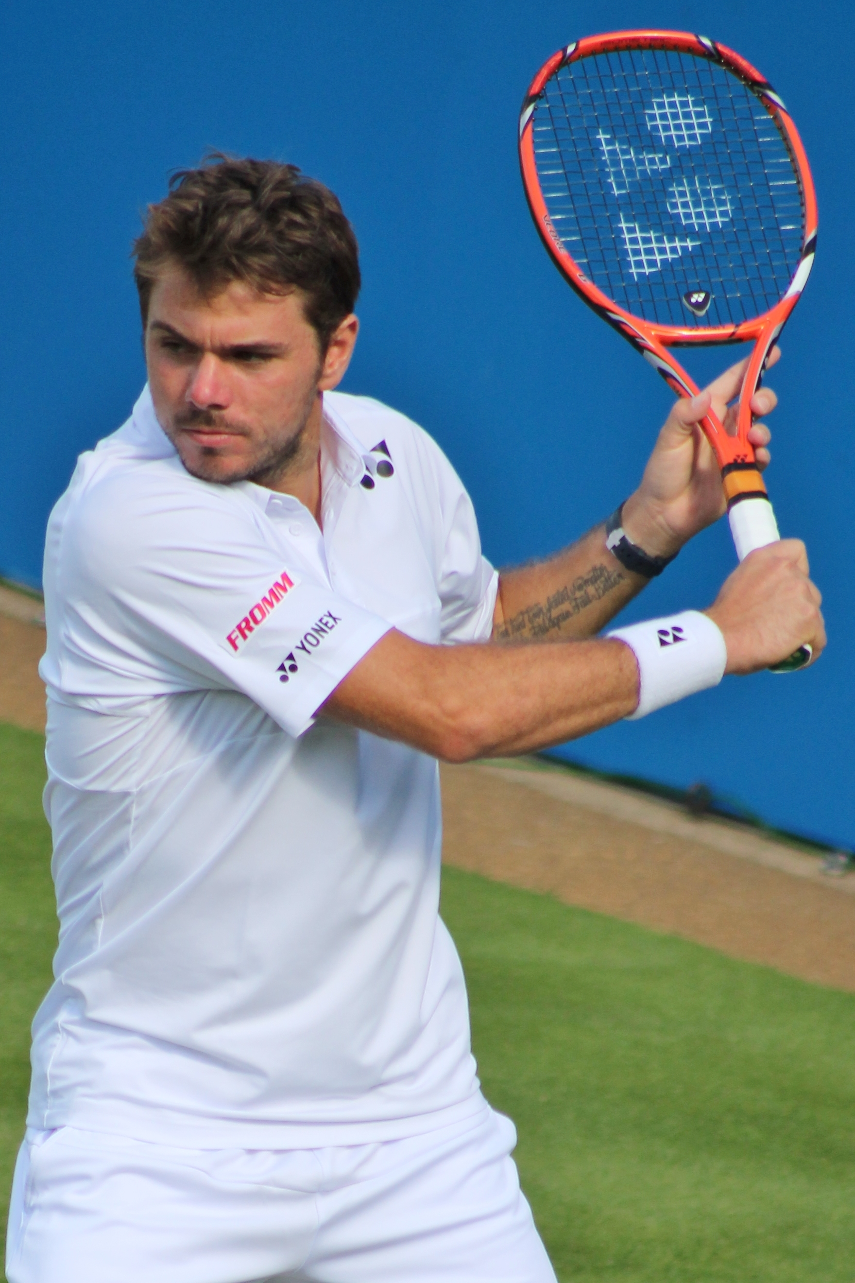 Wawrinka QC15 (1)